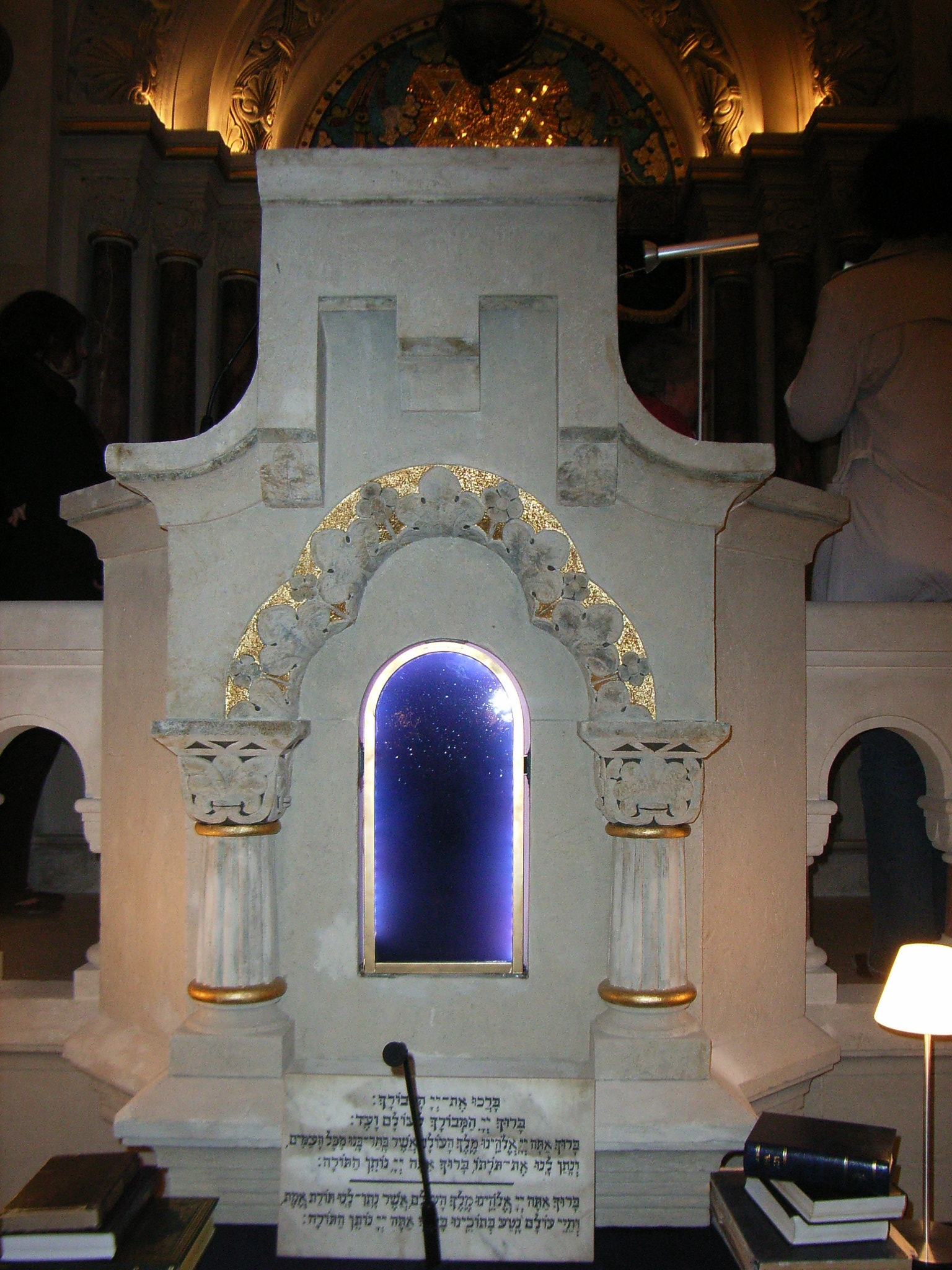 Synagoge Rykestraße in Berlin-Prenzlauer Berg (Deutschland), Toraschrein